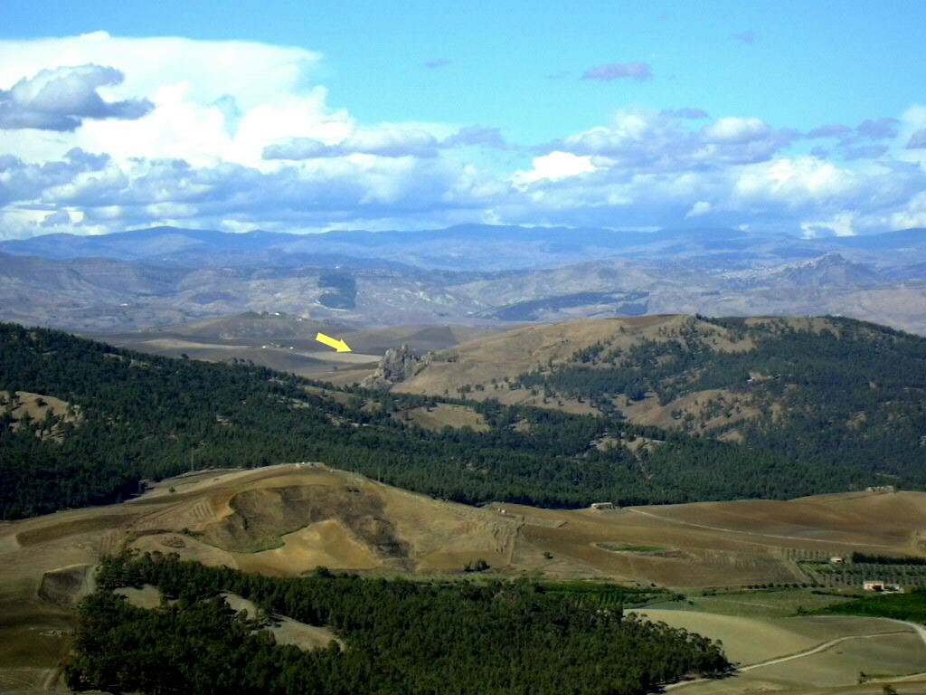 Aidone EN_Sicilia: il castello di Pietrataliata visto dal Belvedere di Aidone